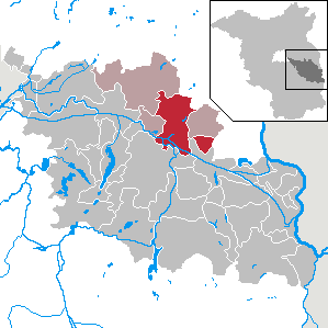 Briesen (Mark) in Brandenburg (Country) - District Oder-Spree